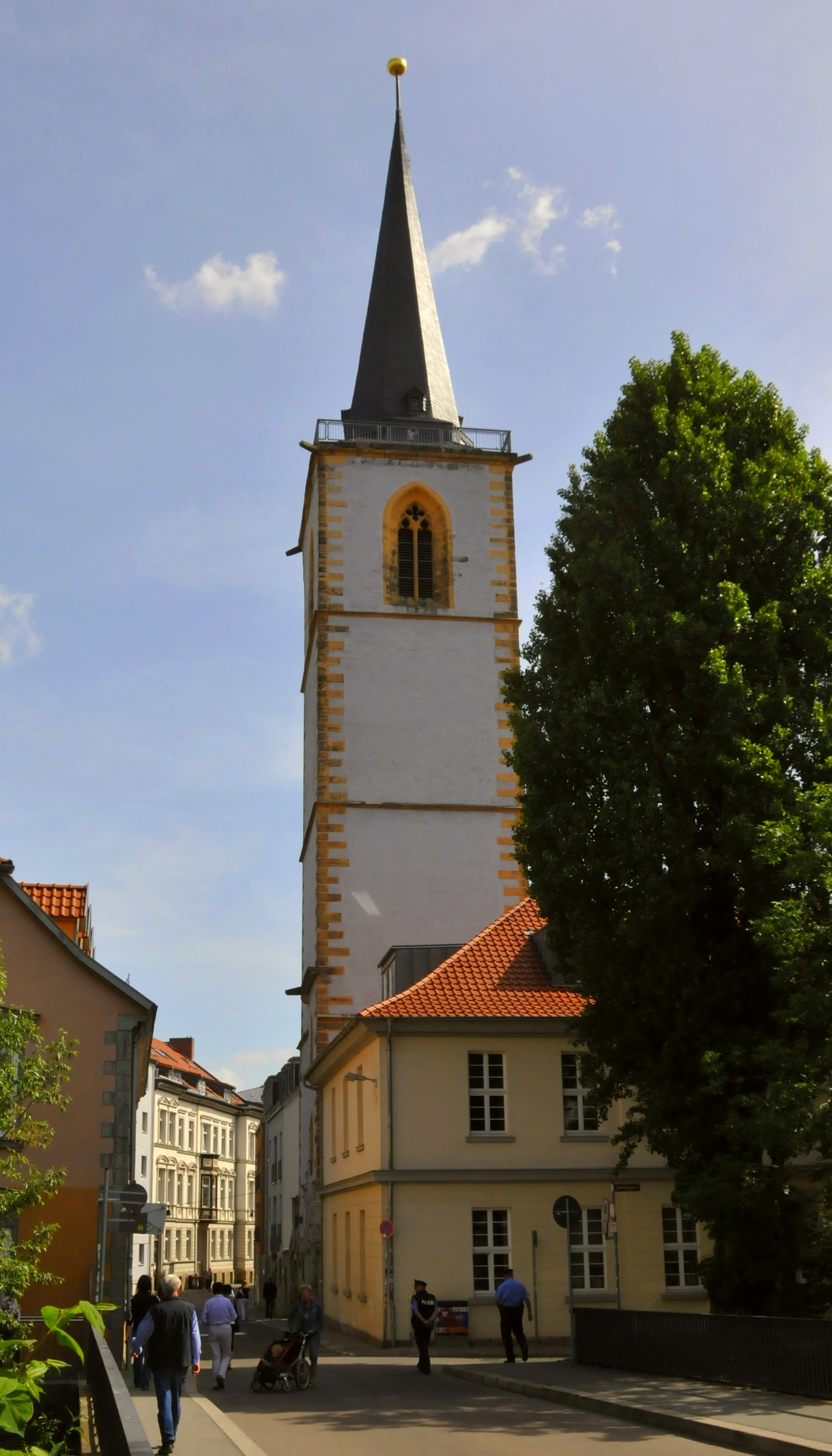 Erfurt, Nicolai-Turm